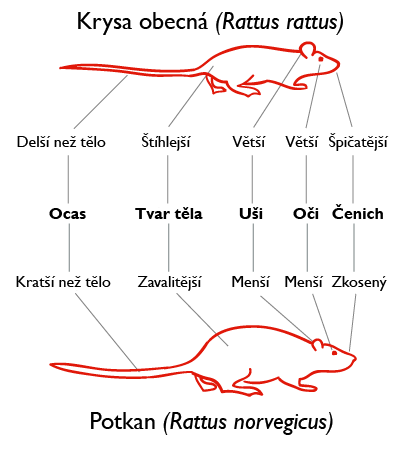 Hlavní rozdíly mezi krysou obecnou a potkanem